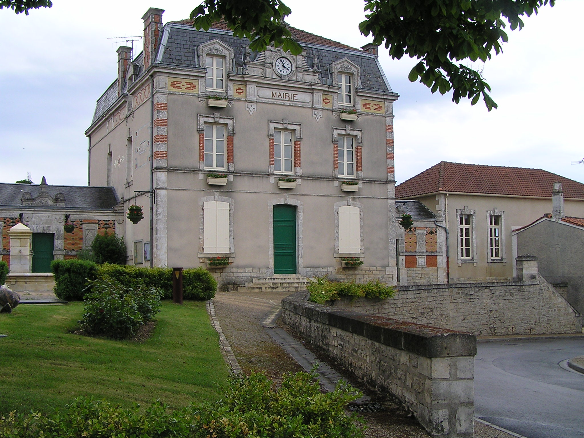 monument aux morts de Villejésus